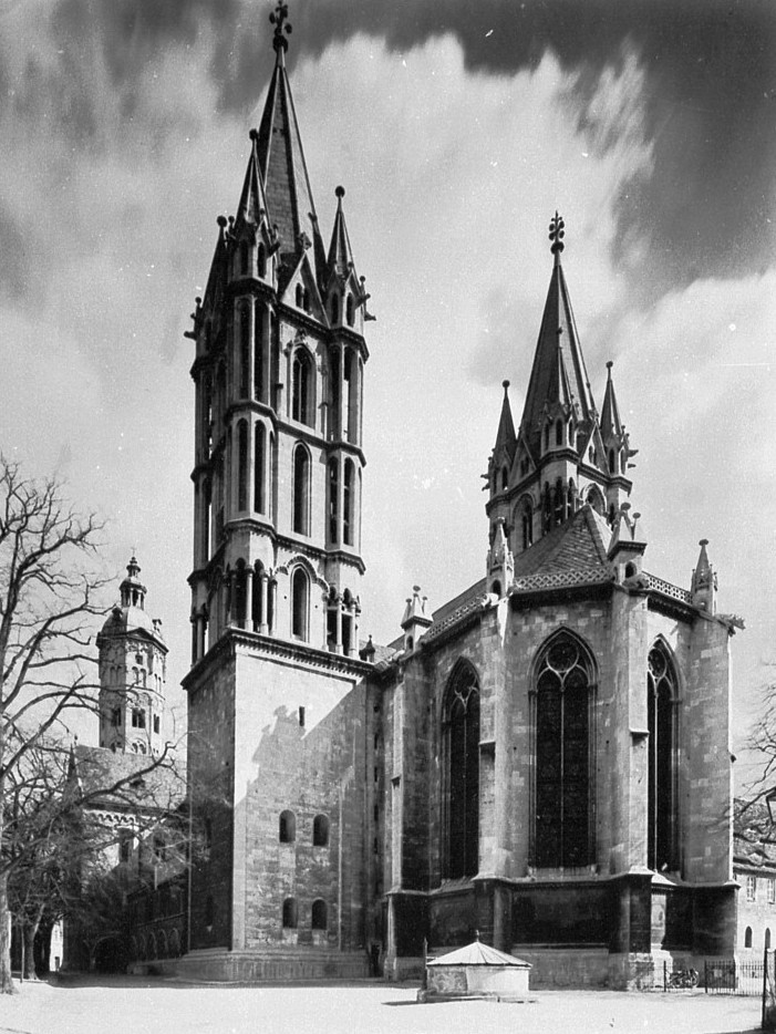 Dom St. Peter und Paul, Naumburg, Deutschland. Aussenbau aus Nordwest.